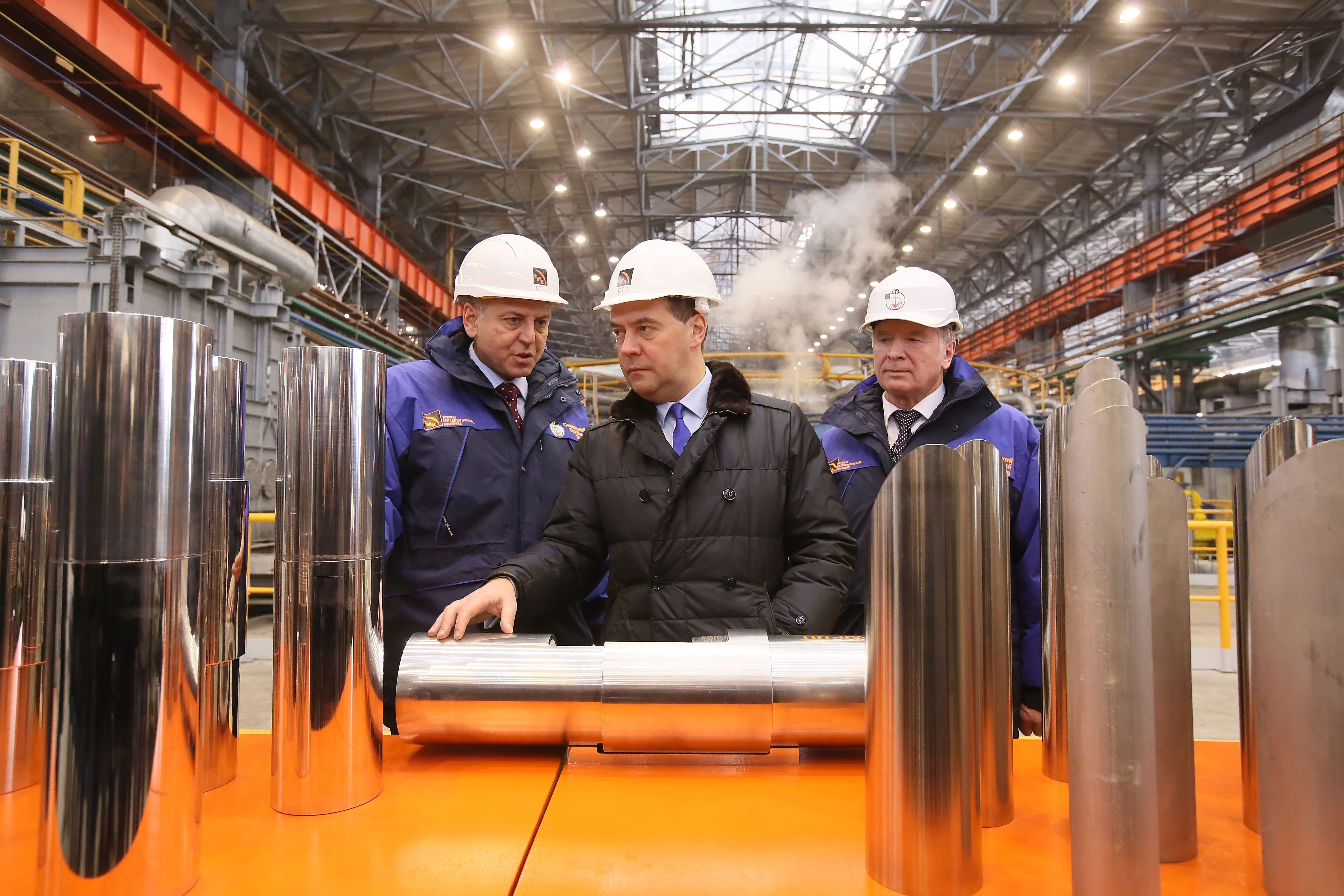 Октябрь-2014